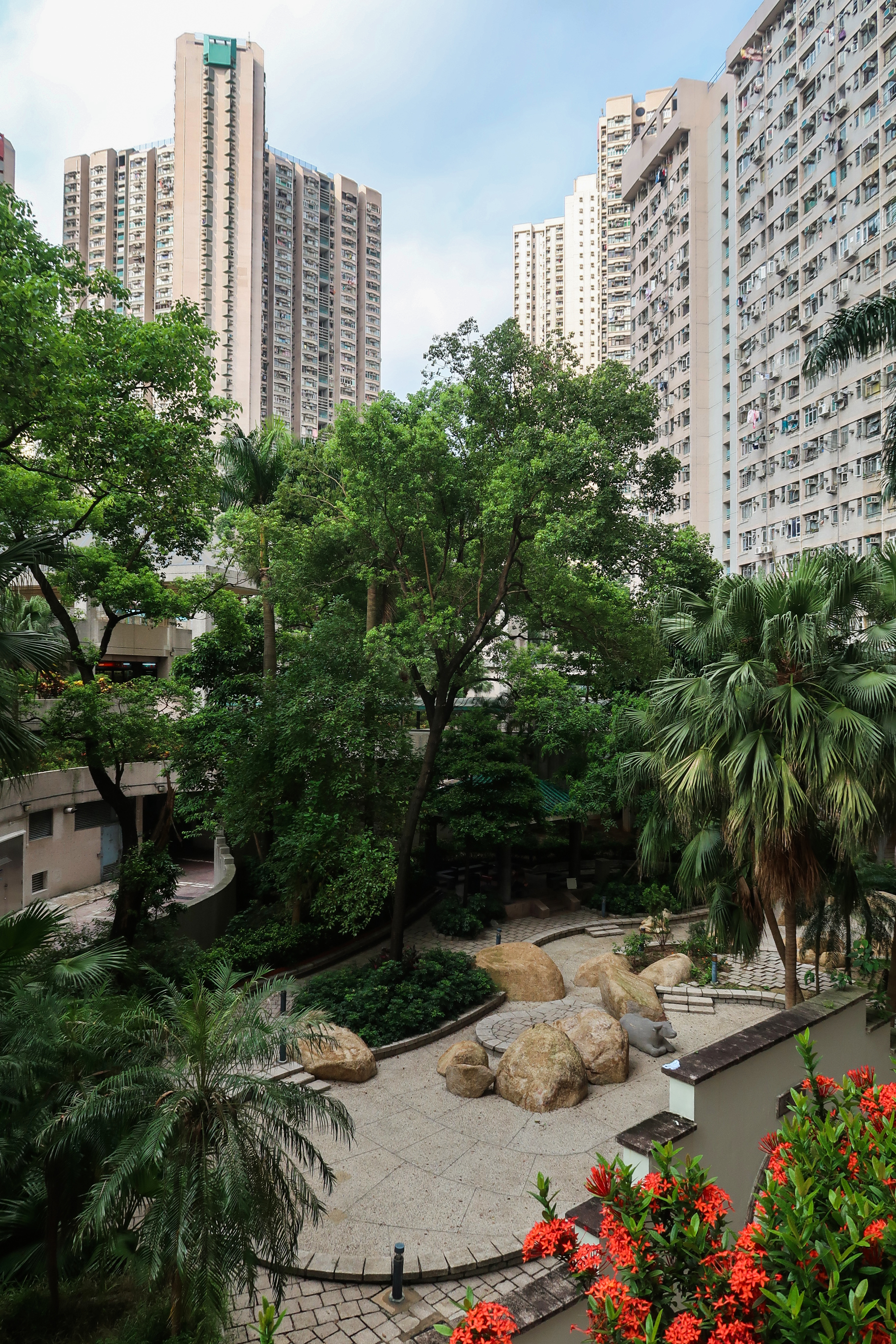 Fung Tak Estate Landscape Area